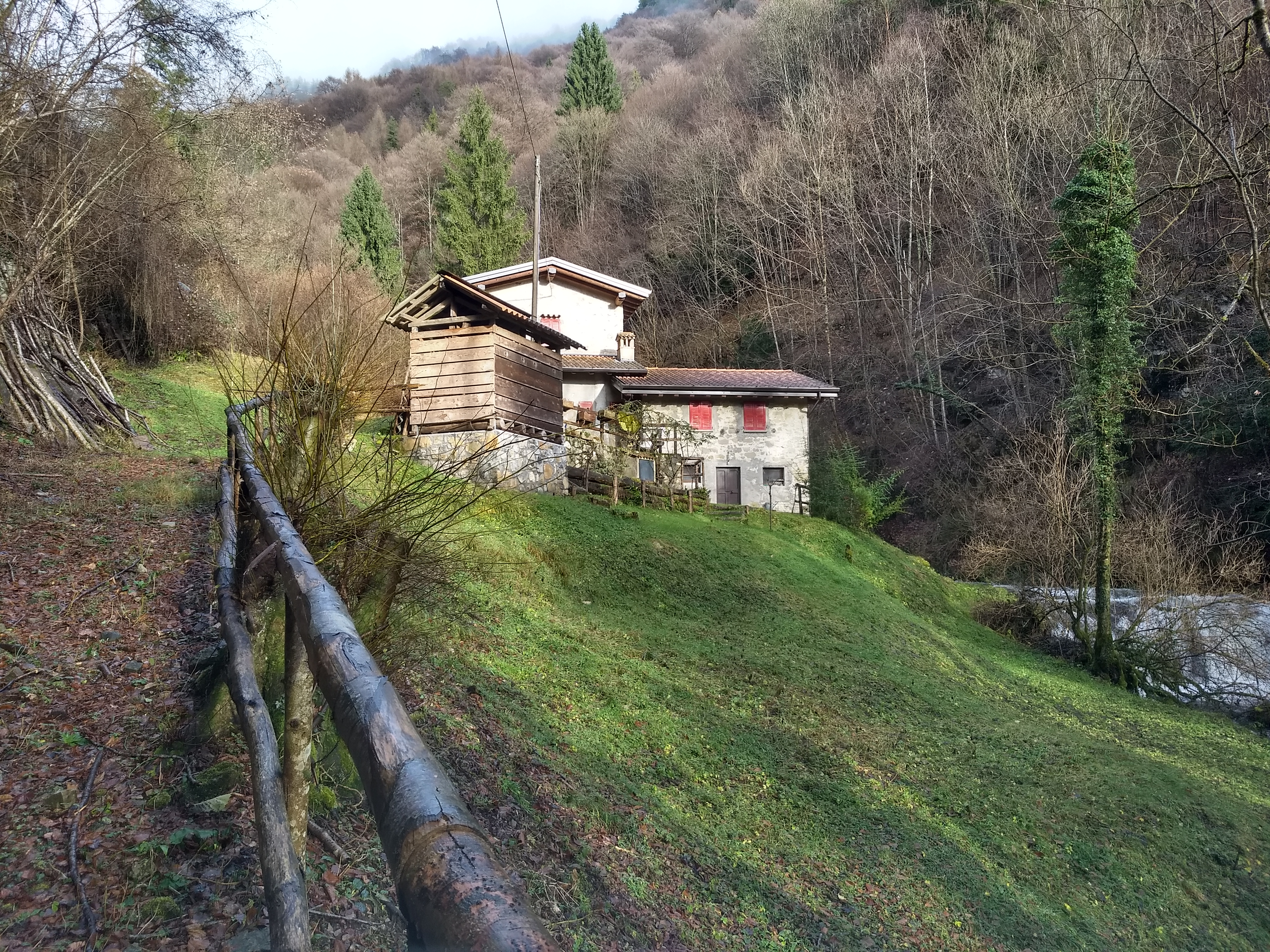 mulino ad acqua a Magasa, provincia di Brescia